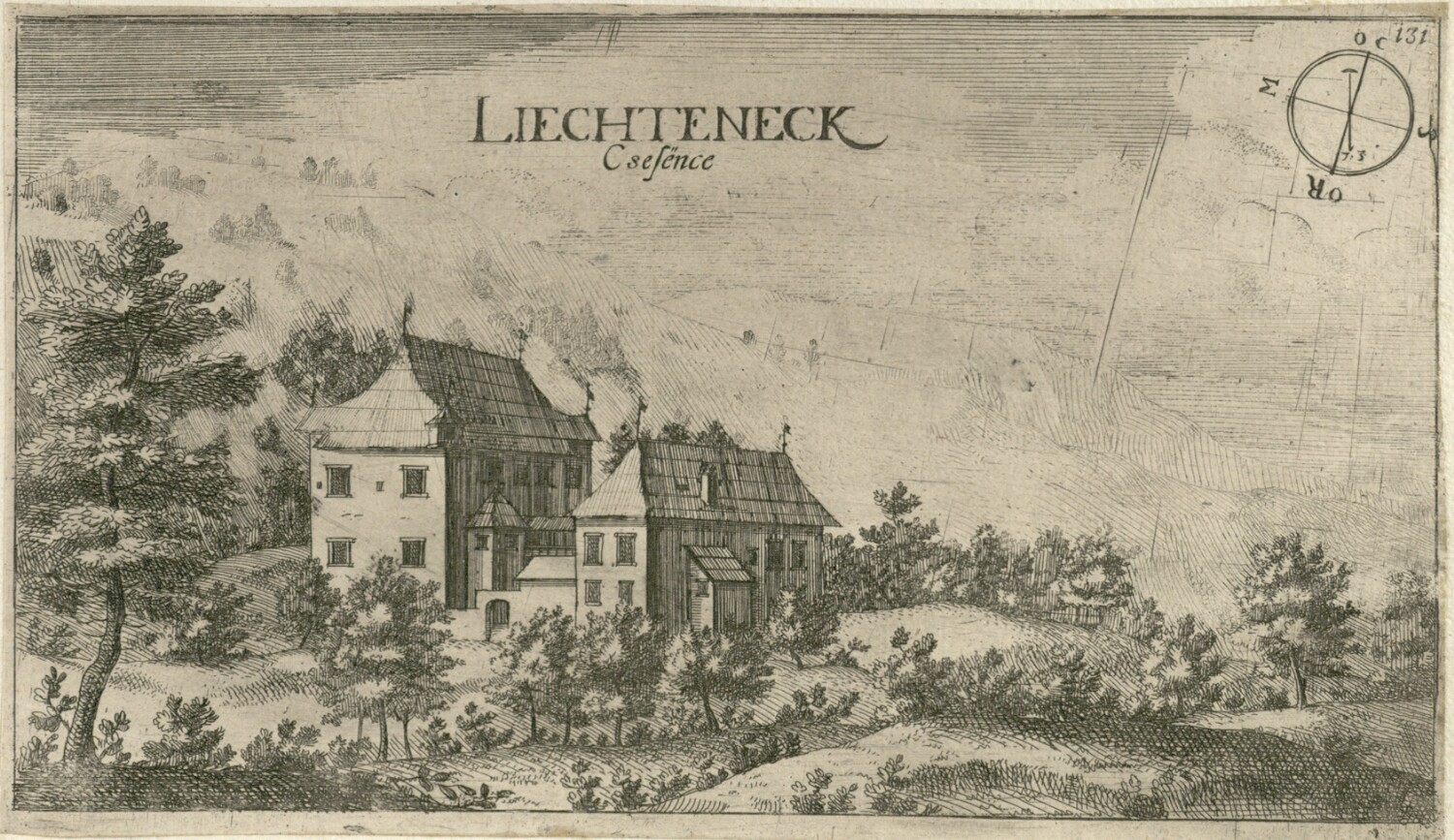 Dvorec Češnjice